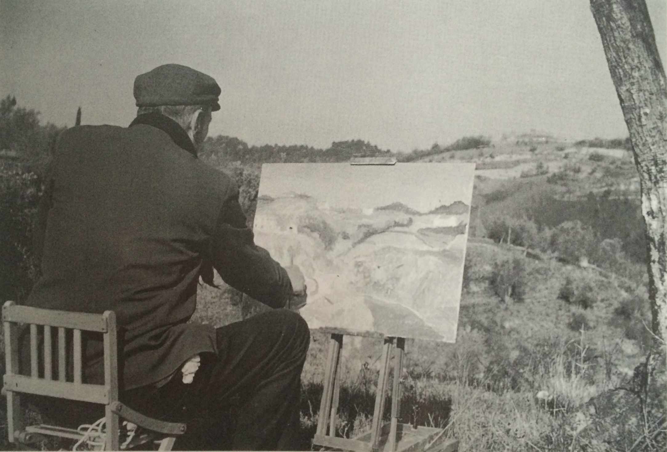 Foto di Menotti Pertici mentre dipinge dal vero